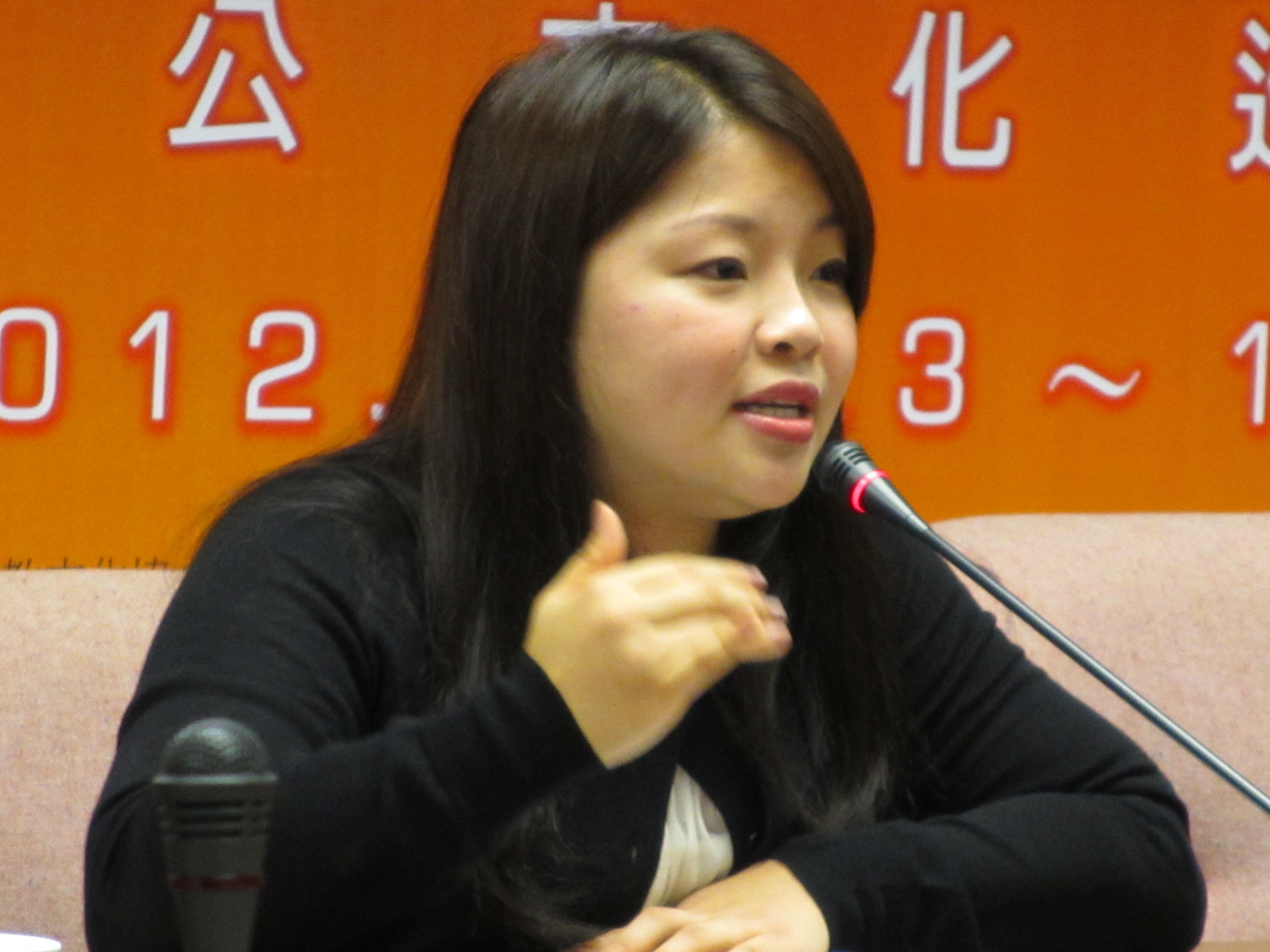 国民党立委 张嘉郡(美国之音张永泰拍摄)